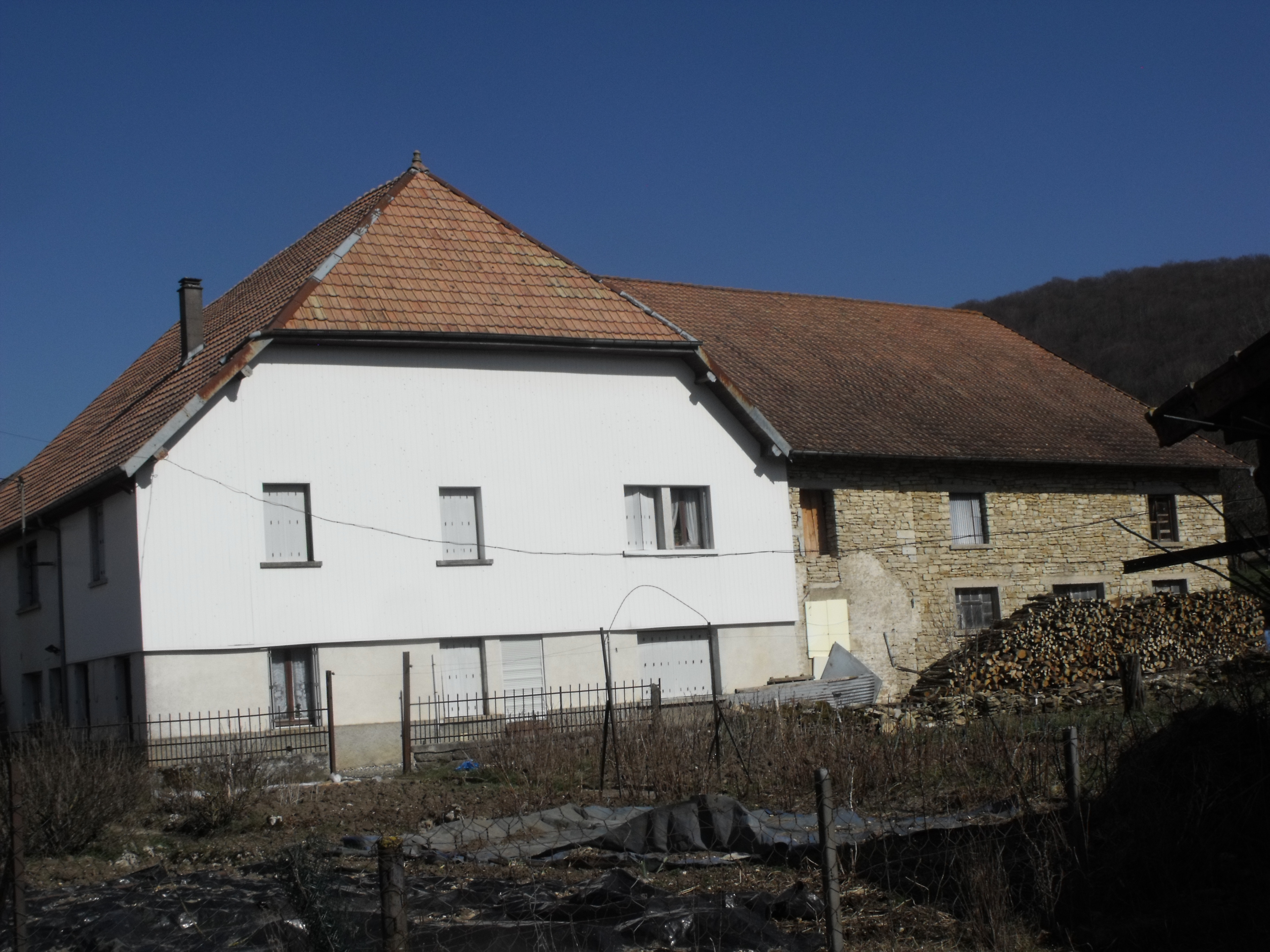 ferme à Orve, Doubs, France